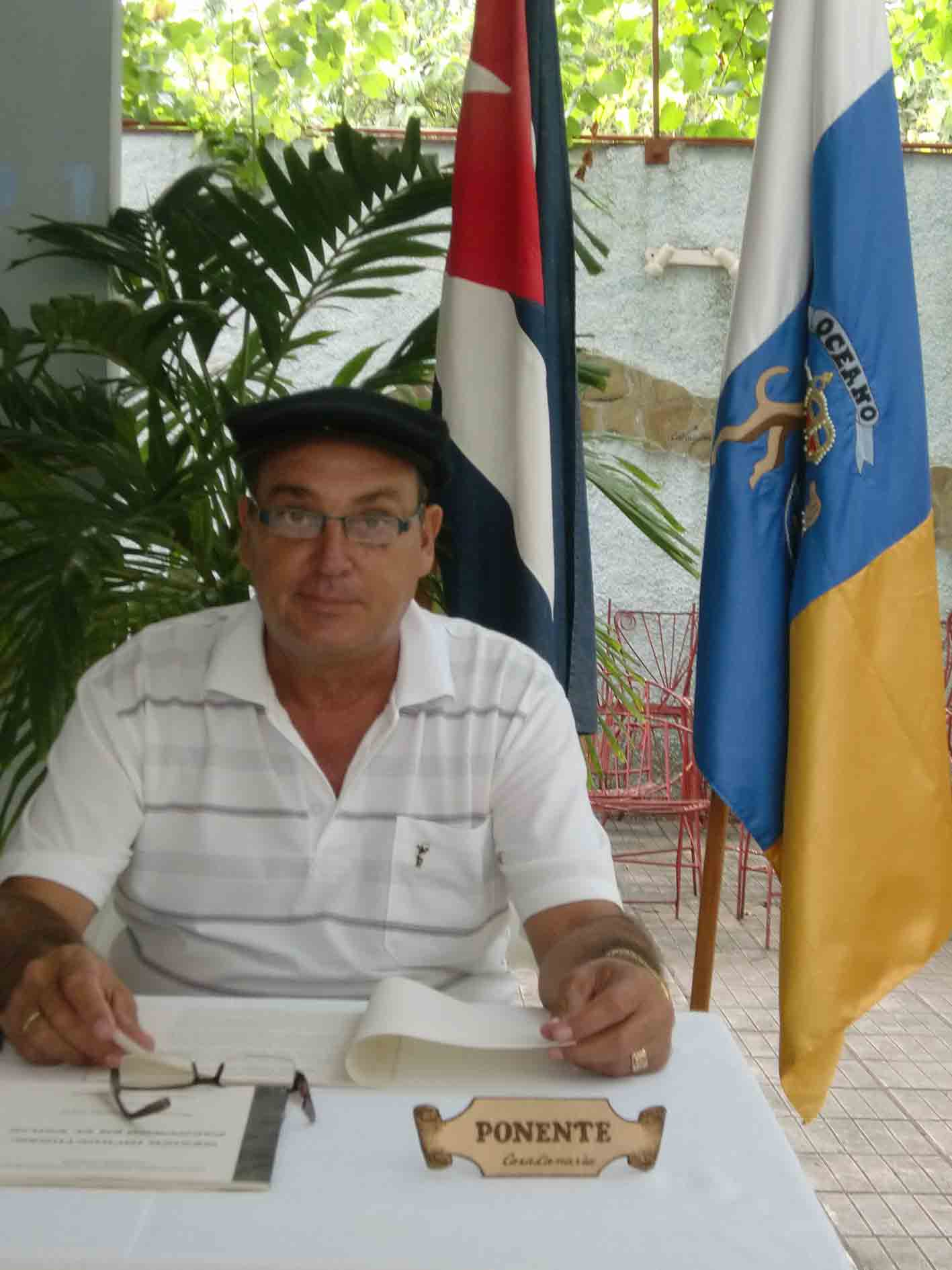 Marío Luis López Isla